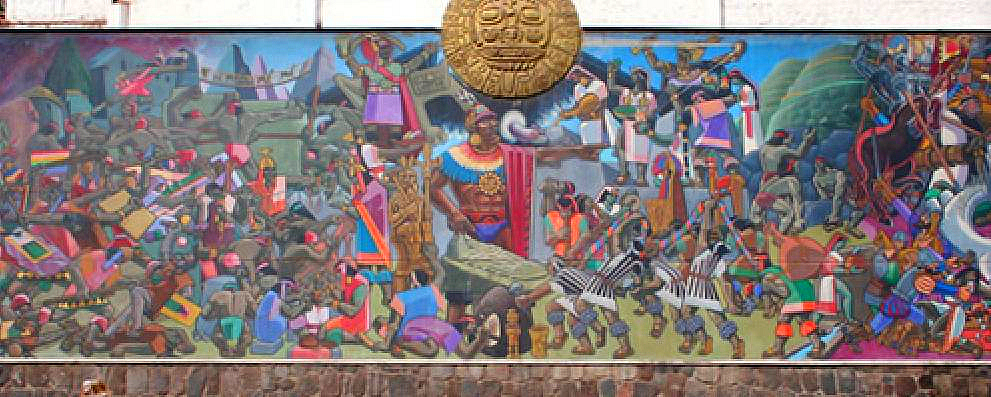 Mural de la historia del Cusco, con el personaje de Pachacútec (al centro), como iniciador y organizador del Tawantinsuyo; mural por Juan Bravo para la municipalidad del Cusco.